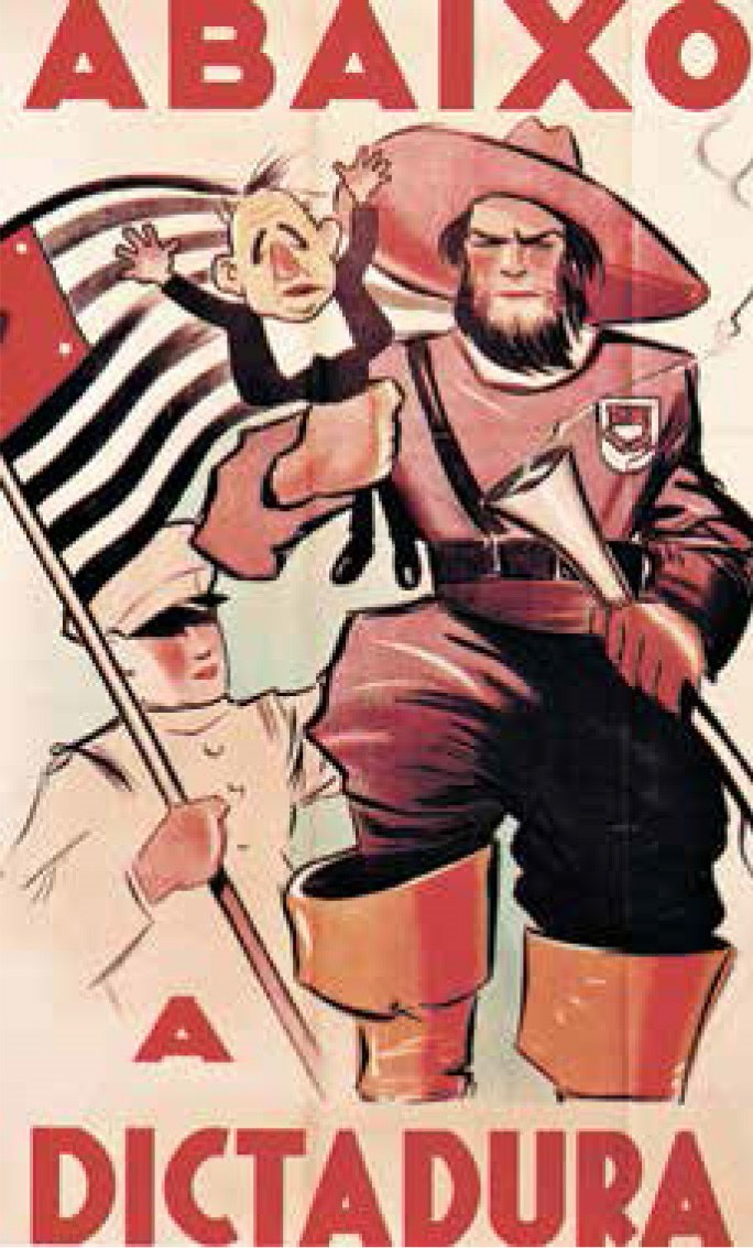 Cartaz protestando contra a ditadura de Getúlio Vargas.